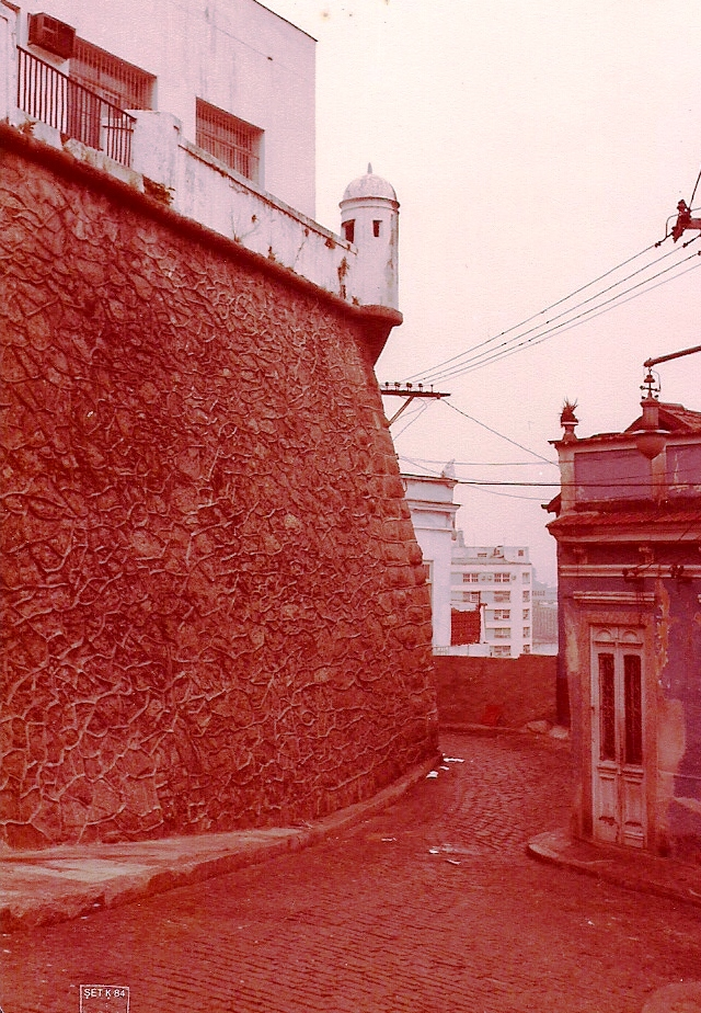 Fortaleza de Nossa Senhora da Conceição, Rio de Janeiro, RJ: aspecto de baluarte com guarita.